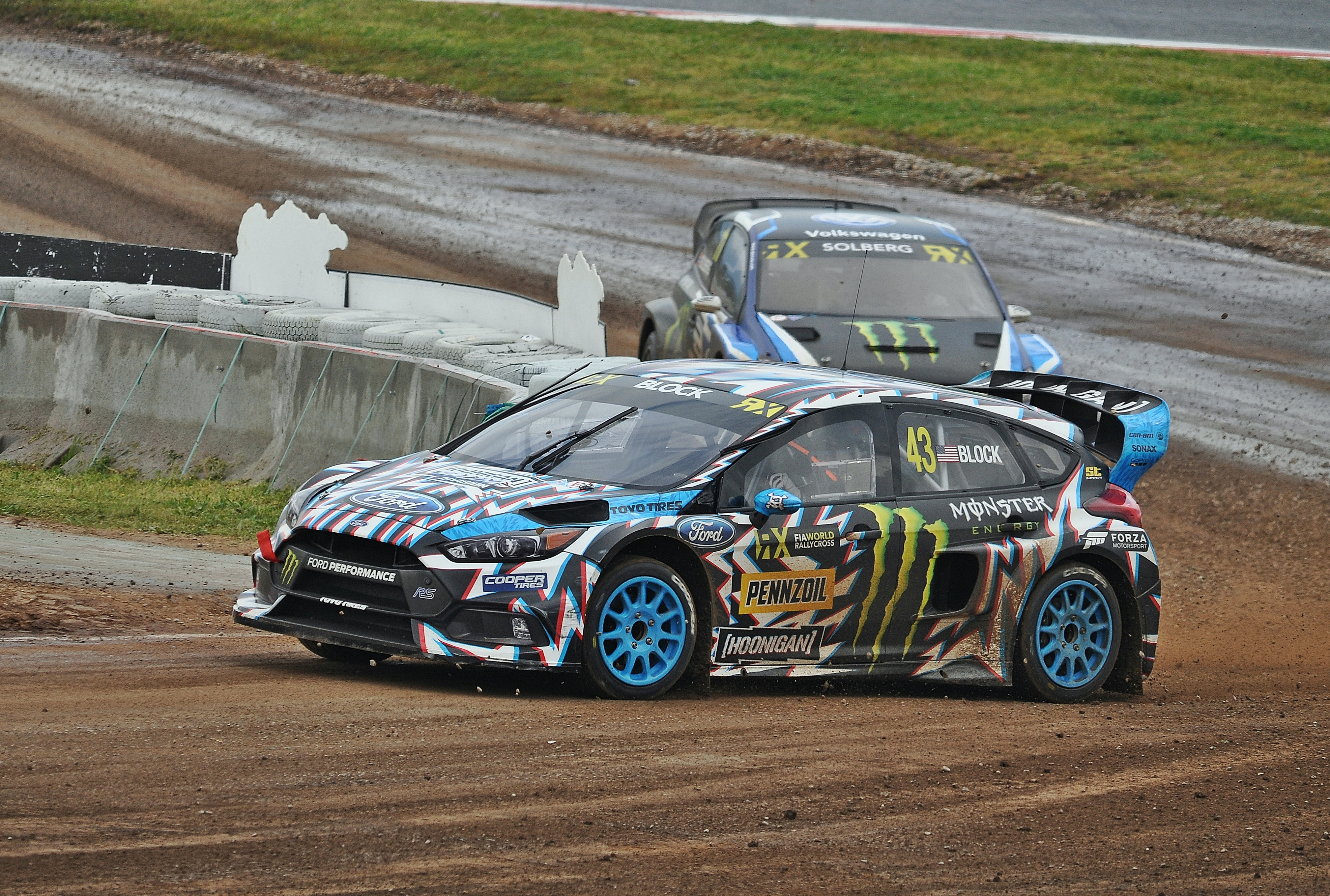 RX Barcelona